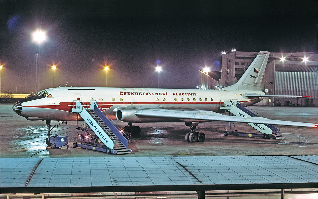 CSA Tupolev Tu-104A